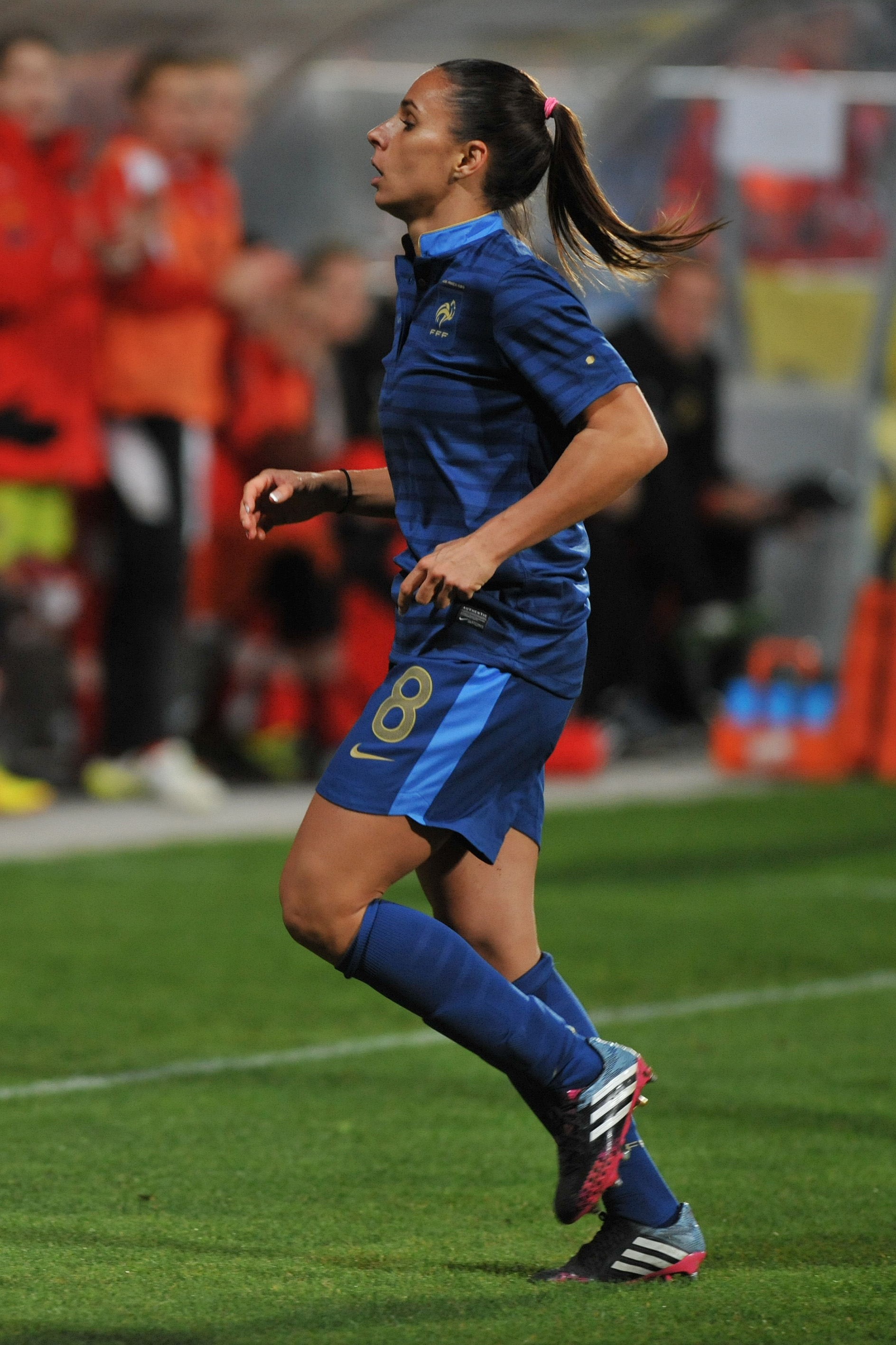 FIFA Women's World Cup 2015 Qualiying Round Österreich - Frankreich am 31. Oktober 2013 in Ritzing: Jessica Houara